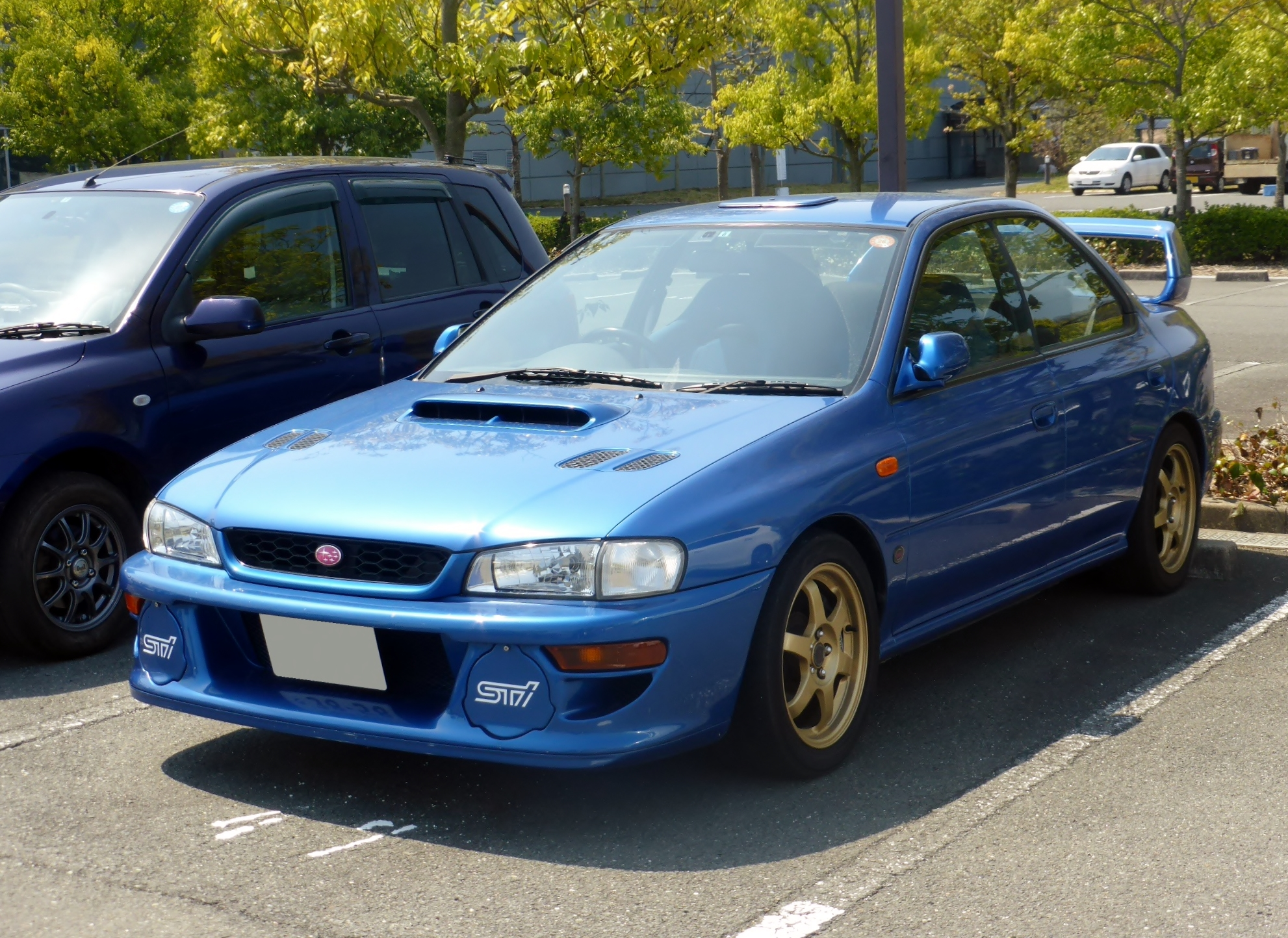 GC型スバル・インプレッサWRXタイプRA STiをフロントから撮影。